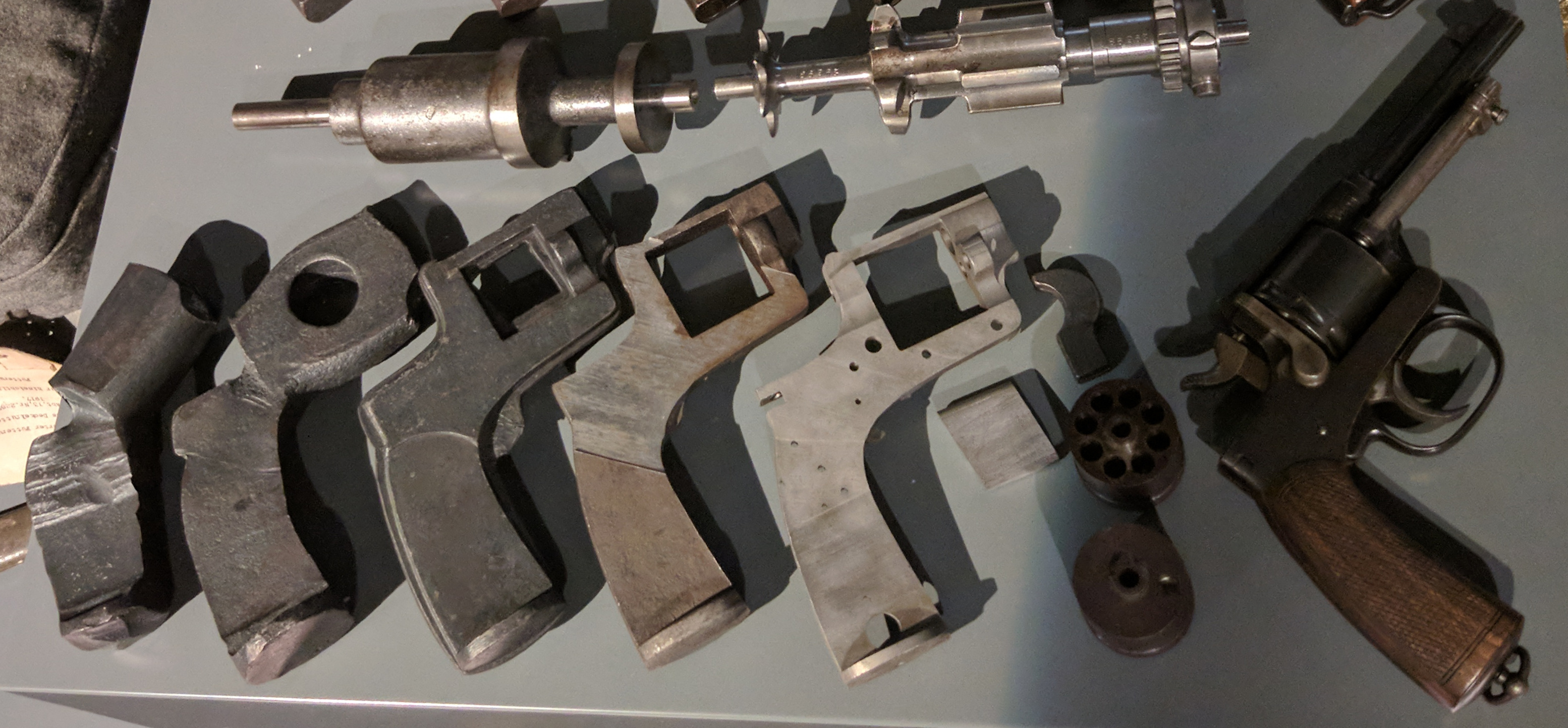 Postopek izdelave avstroogrskega revolverja Rast & Gasser M1898